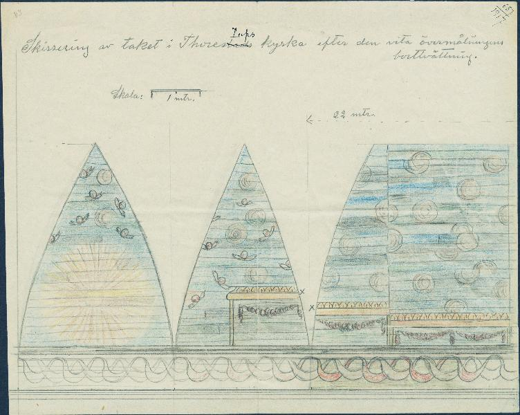 Takmålning, skiss efter den vita övermålningens borttvättning. Kategori: (03) Målningar på träTakmålning, skiss efter den vita övermålningens borttvättning.